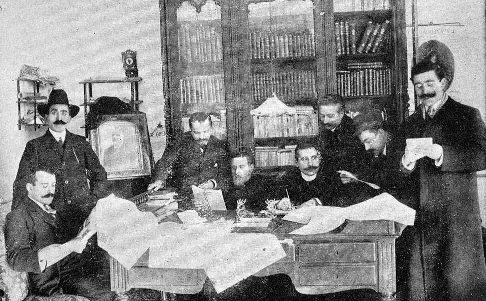 Redacción de El Eco de Orense en 1909. Fotografía en Vida Gallega.De esquerda a dereita:Enrique Cantón, José Adrio, Modesto L. Carbajal, Antonio Fuentes (director), Alfonso Carballo Rey, Julio Carballo Enríquez, Juan J. Reza e Antonio López.